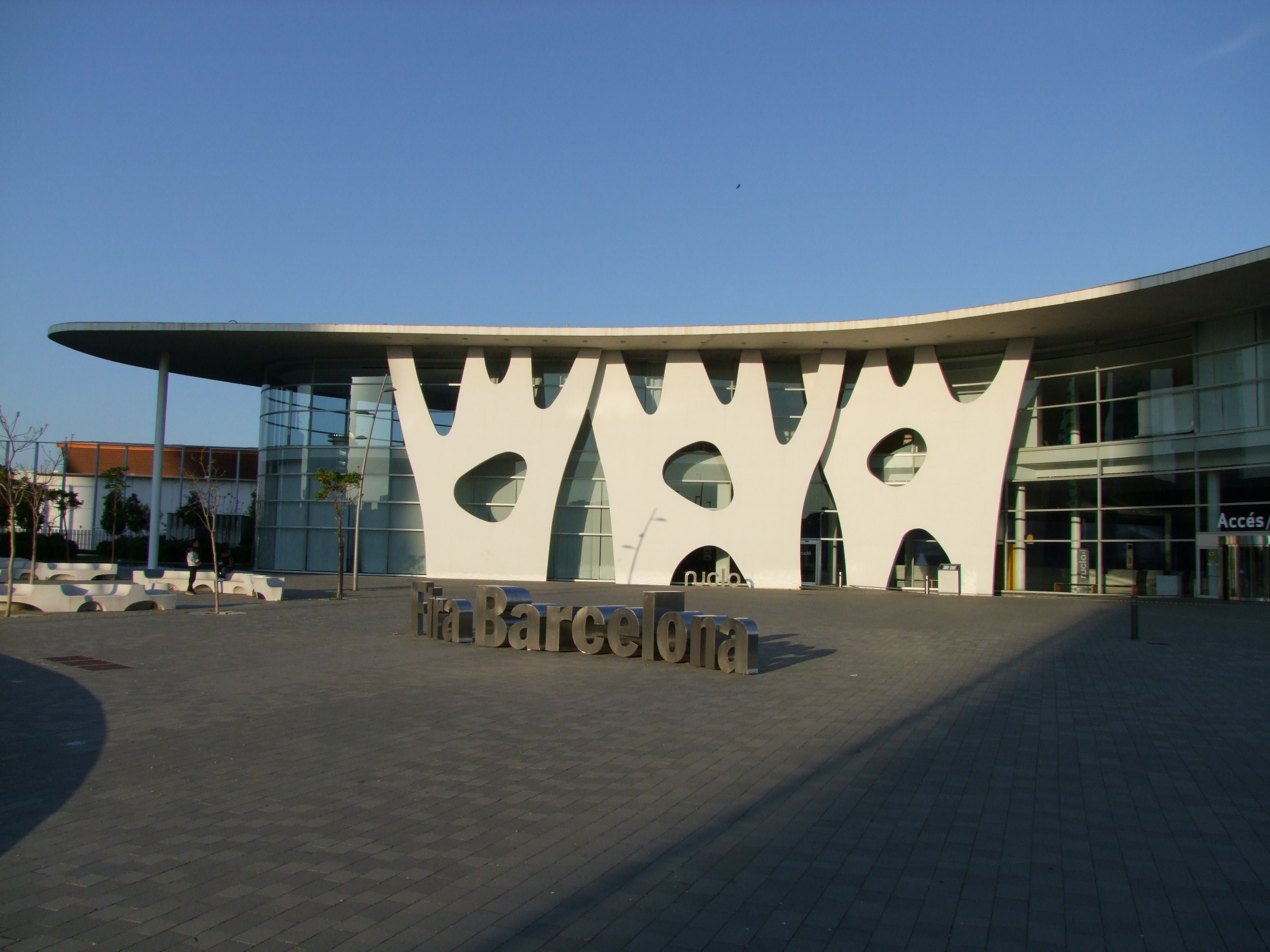 L'Hospitalet de Llobregat, Barcelona, Spain